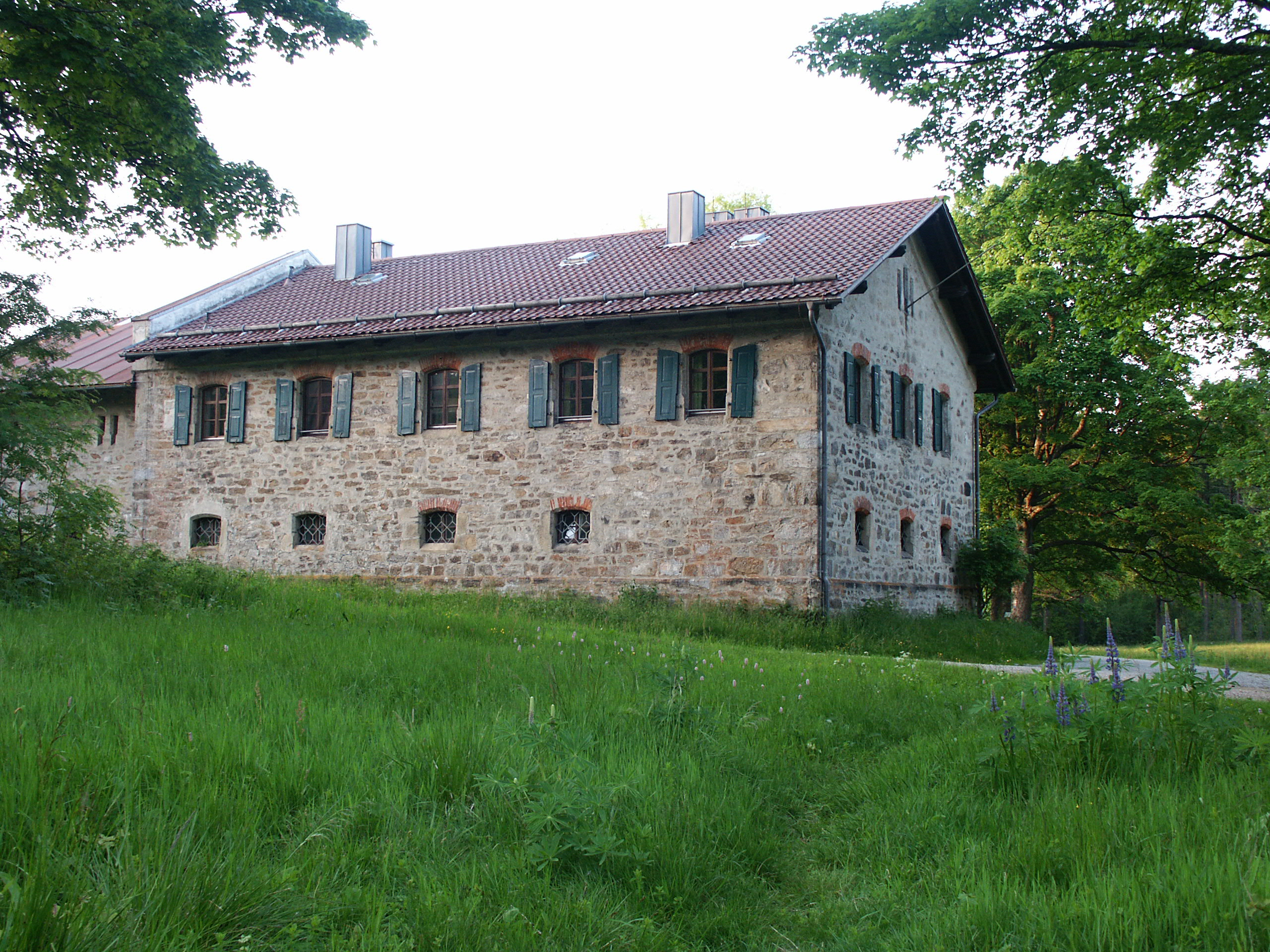 Ehemaliges Forst- und Gasthaus auf der Ödwies (Gemeinde Achslach)